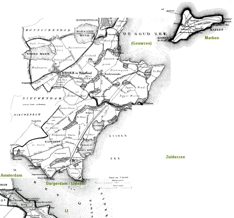 Kaart van het oostelijk deel van Waterland, met duidelijk zichtbaar het tracé van het Goudriaankanaal. De kaart is samengesteld uit gemeentekaarten uit ca. 1880. Zelfgemaakt werk dus uit rechtenvrije afbeeldingen in het publiek domein.